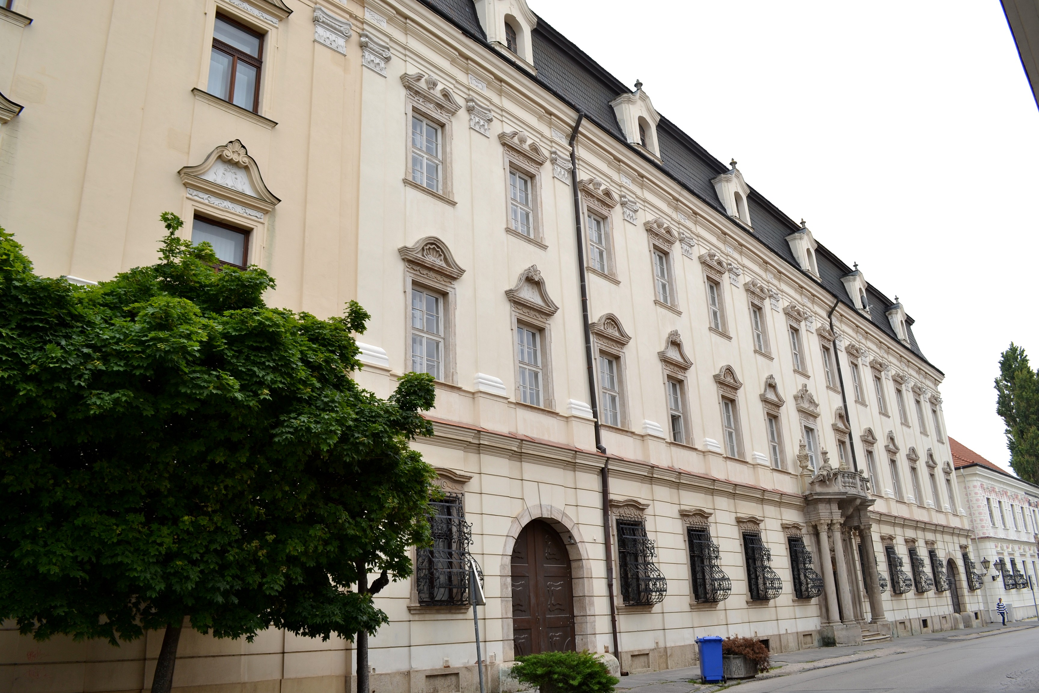 Trnava, komplex univerzitných budov; budova Šľachtického konviktu (Convistus nobilium). V budove dnes sídli Arcidiecézny tribunál Arcibiskupského úradu